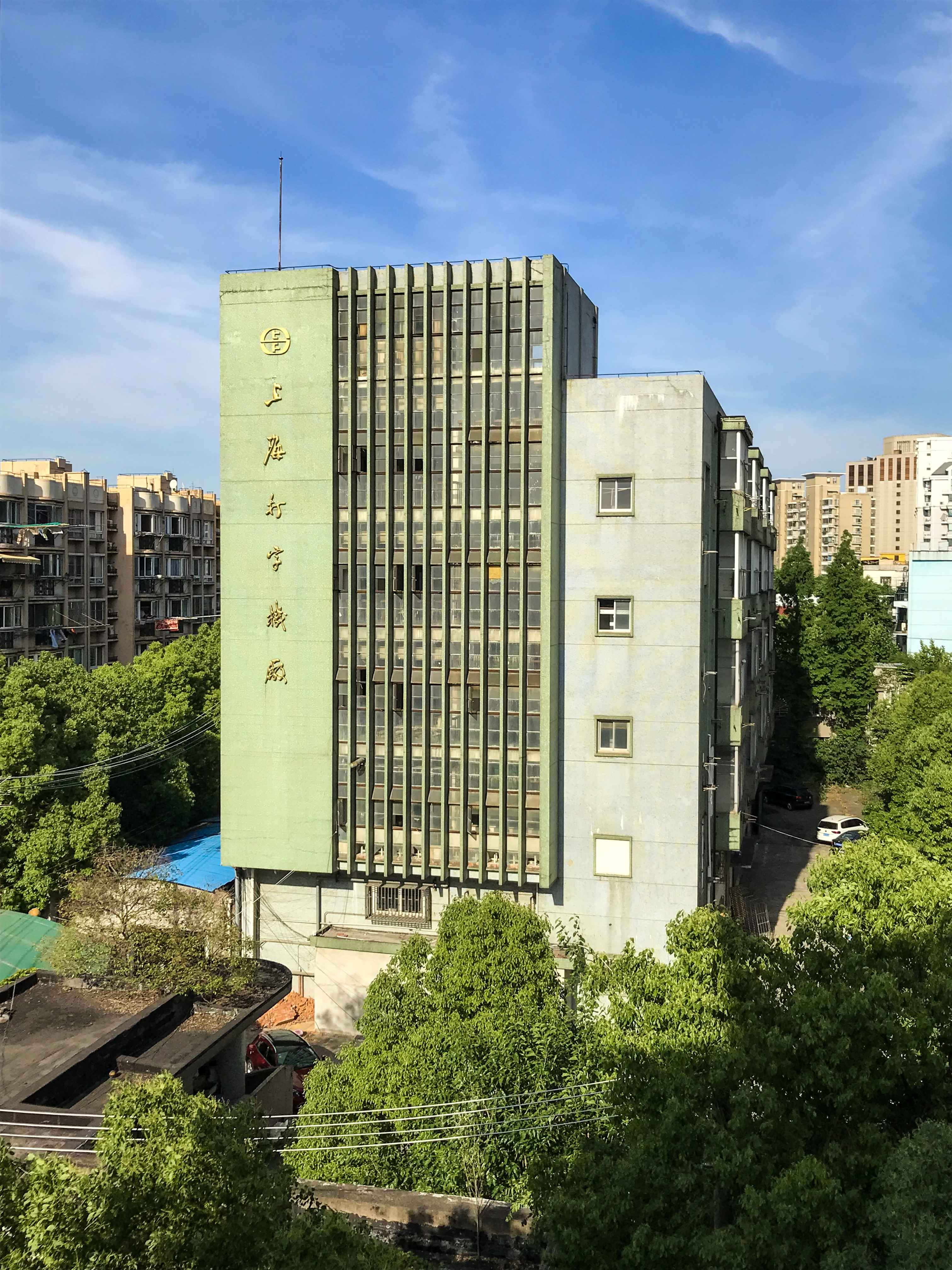 中文（中国大陆）: 上海打字机厂 文治路5号